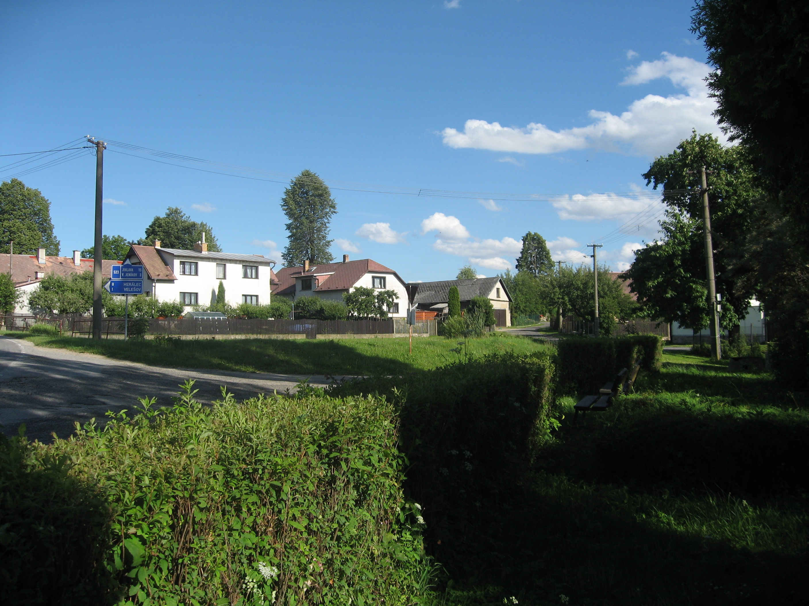 Kalhov